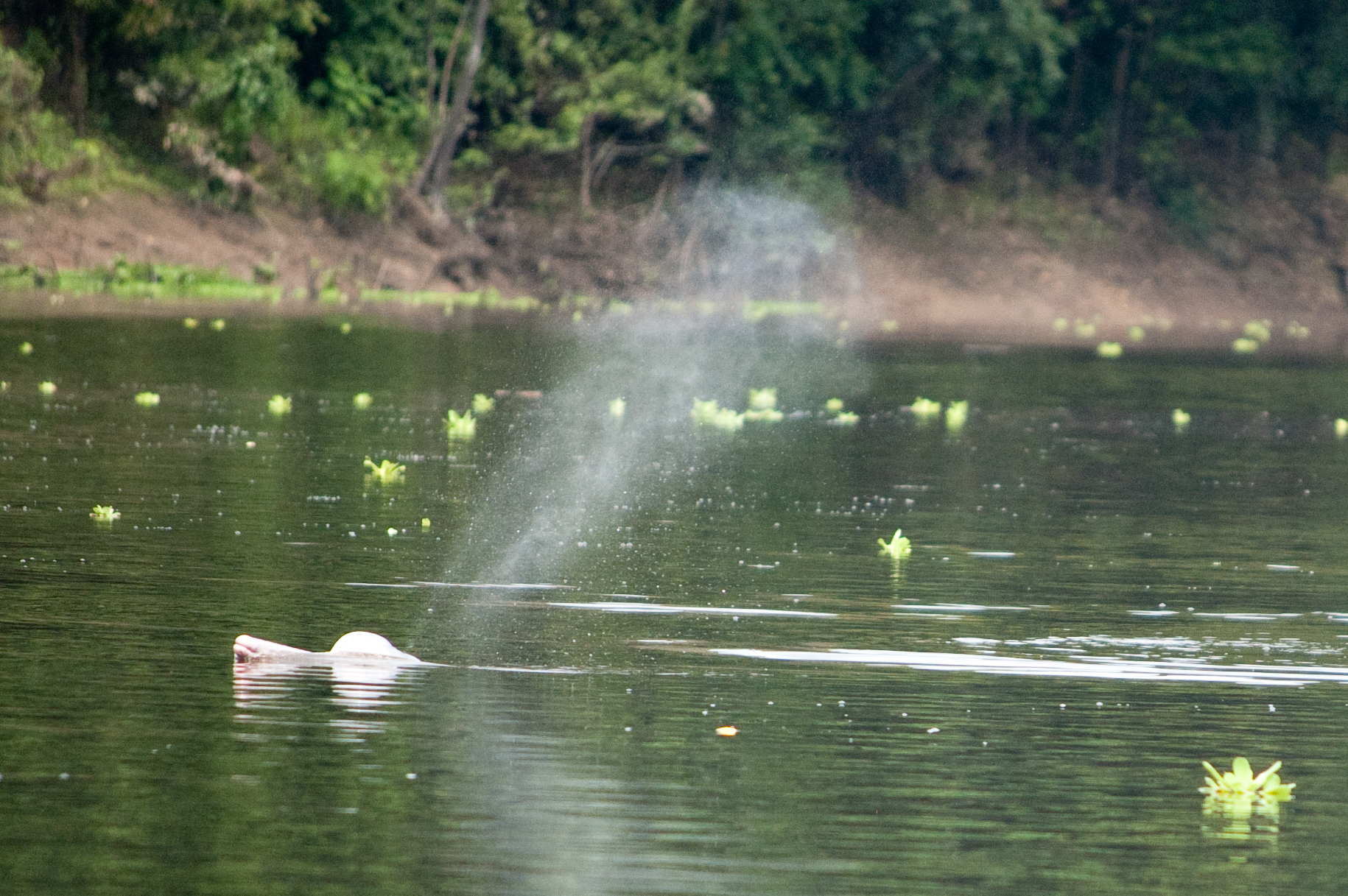 Delfín rosado soplando, Loreto, Perú